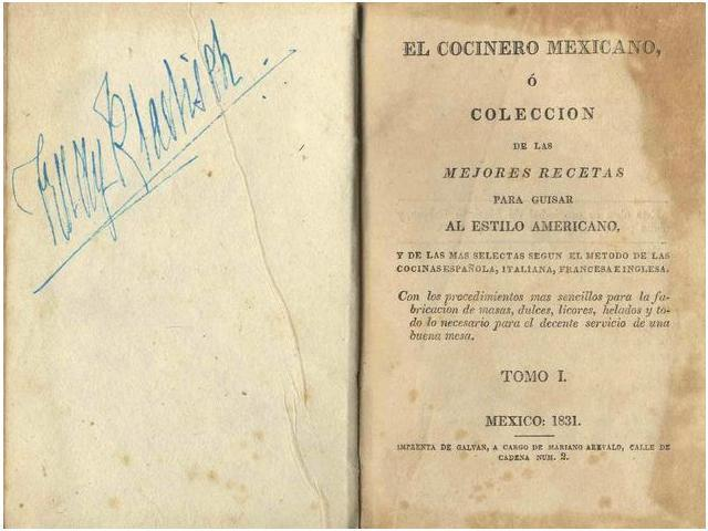 El cocinero mexicano ó coleccion de las mejores recetas para guisar al estilo americano, y de las mas selectas segun el metodo de las cocinas española, italiana, francesa e inglesa. Tomo I. México: Imprenta de Galván, 1831. 8º menor. XI-314 páginas, 11 hojas. Ilustrado con una lámina (de dos). Piel de la época. Solo el tomo I [de III, que consta la obra].